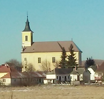 Szent Imre-templom, Bátor This is a photo of a monument in Hungary. Identifier: 5424